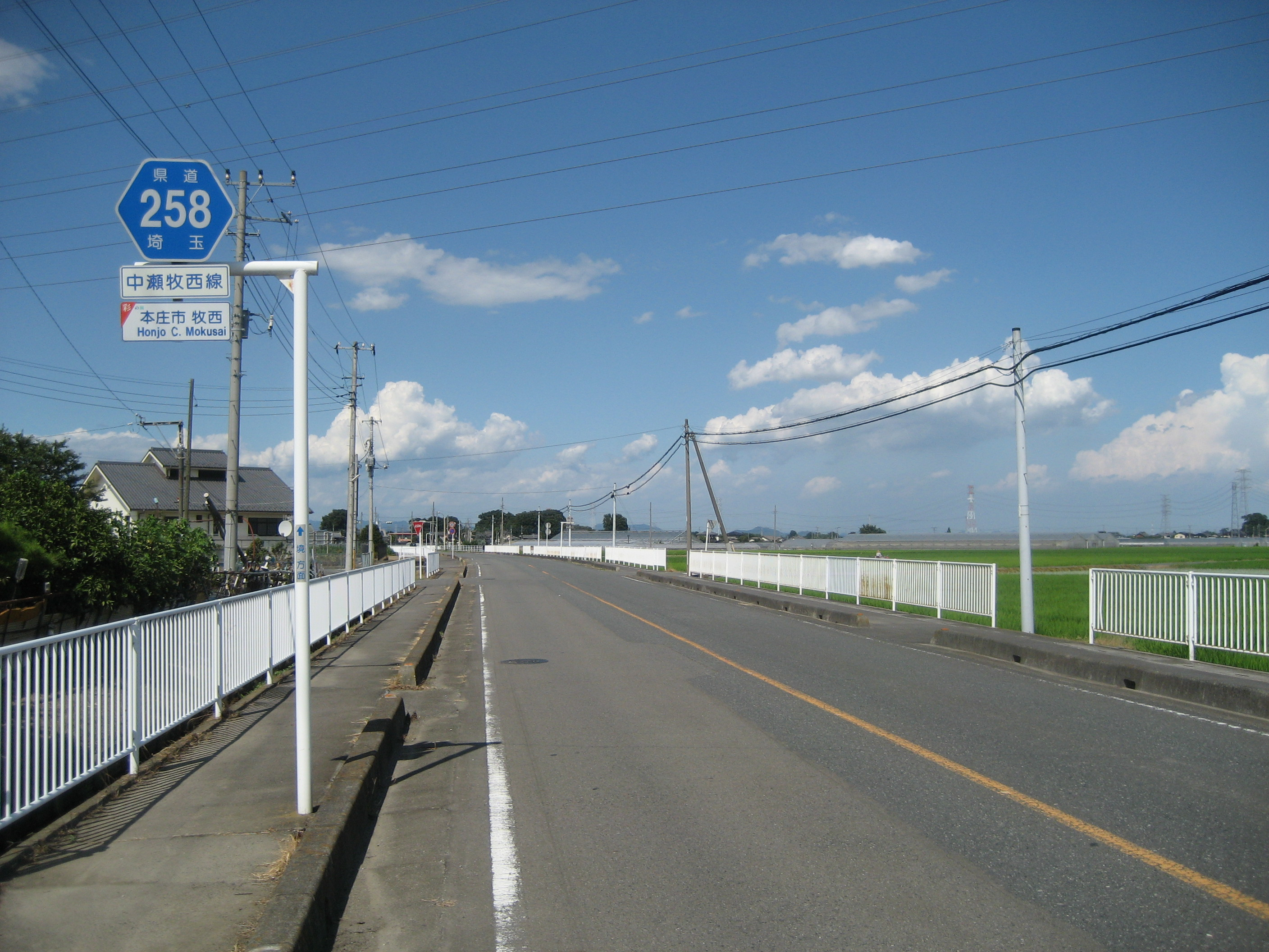 埼玉県道258号線本庄市牧西